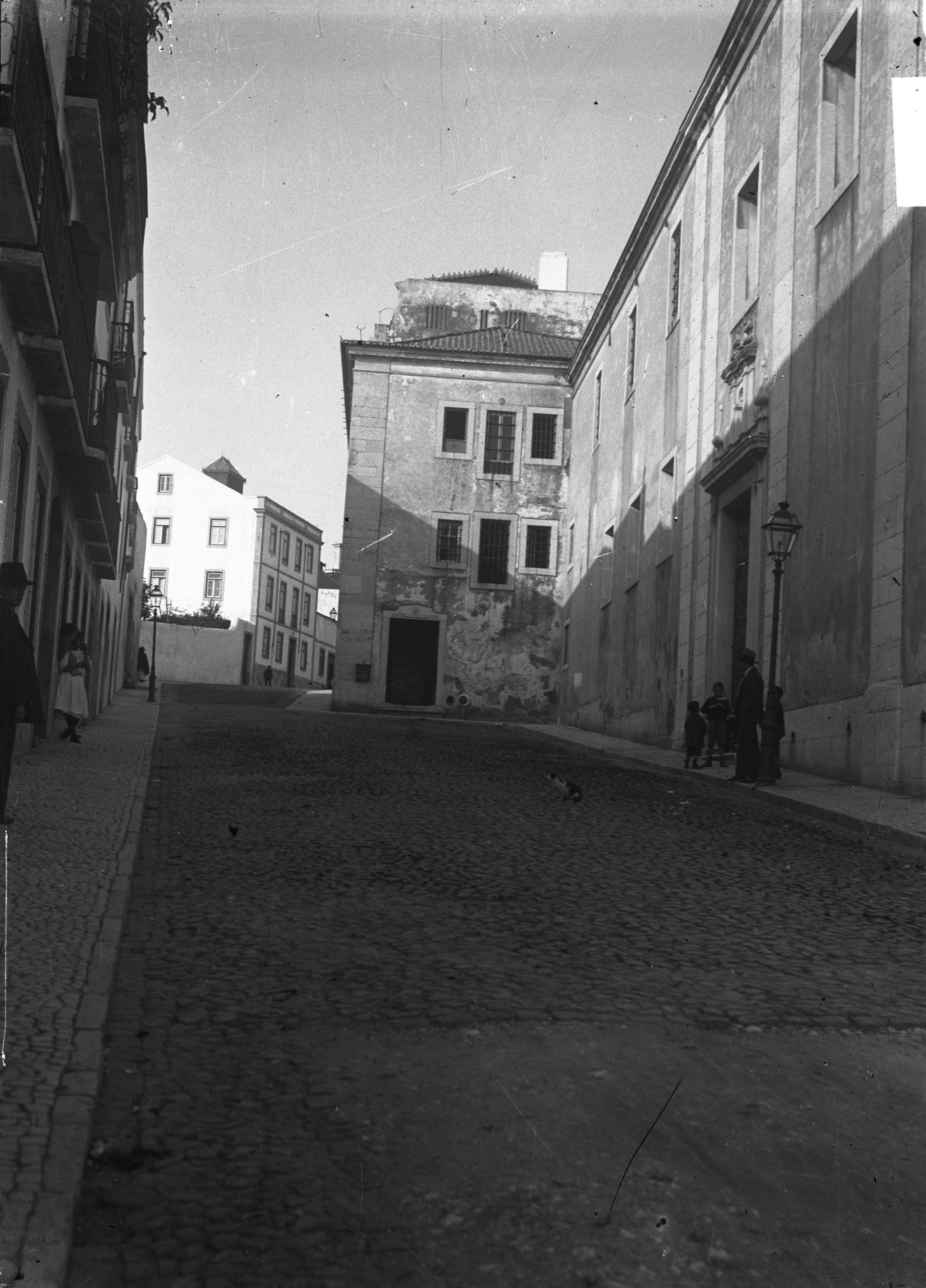 Título: Convento das Mónicas - estabelecimento prisional das Mónicas Dimensão: 9 x 12 cm Suporte: Negativo de gelatina e prata em vidro Unidades de descrição relacionadas: Cód. Referência: PT/AMLSB/POR/053392 Título: Convento das Mónicas, estabelecimento prisional das Mónicas Notas: Inscrição no original: 6405, M11. O edifício tornou-se cadeia civil de mulheres em 1917. Assunto: Cadeia das Mónicas / Candeeiro de rua / Convento das Mónicas Local: Travessa das Mónicas Freguesia: Graça Código de referência: PT/AMLSB/BAR/000270